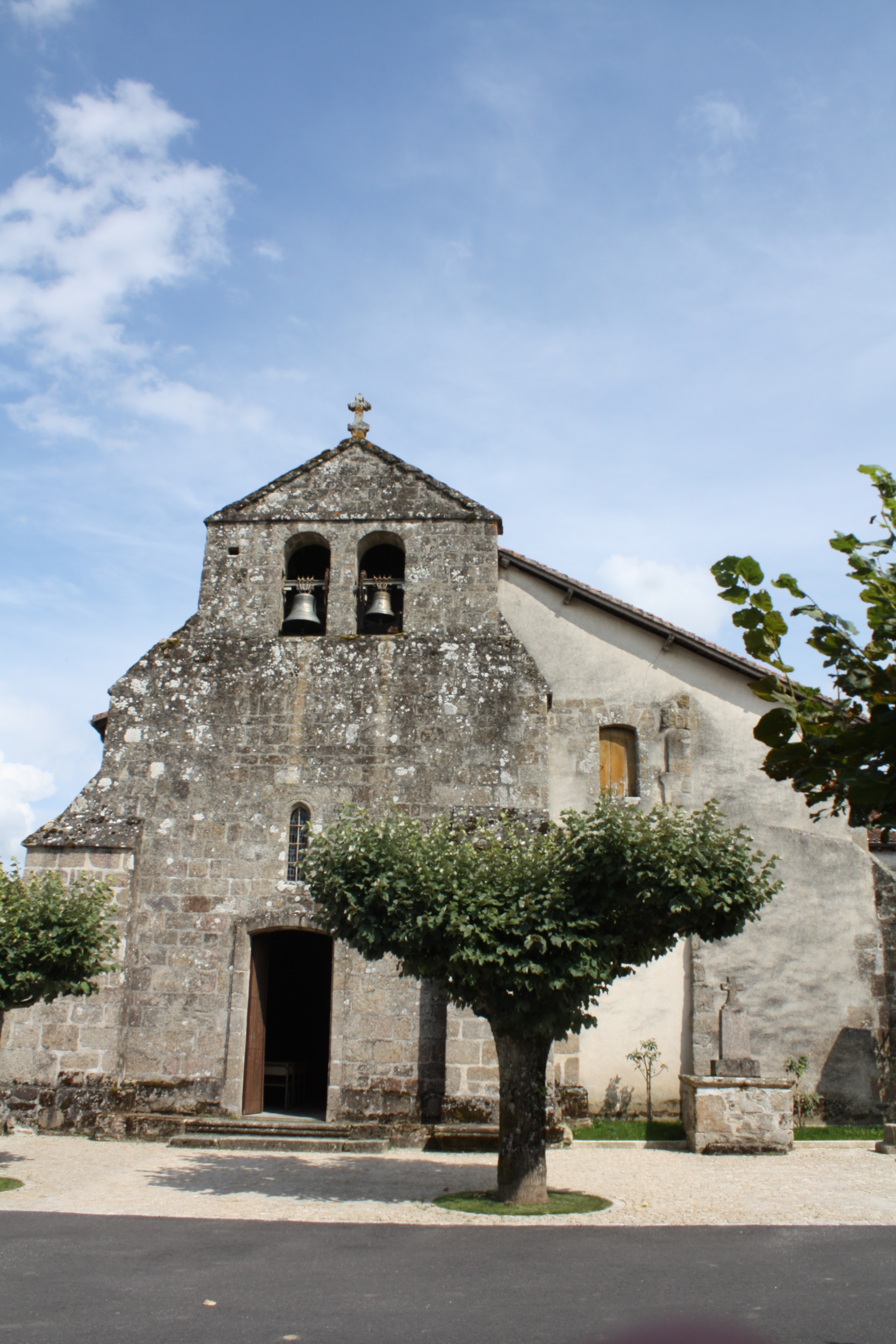 Église Saint-Yrieix de Saint-Yrieix-sous-Aixe